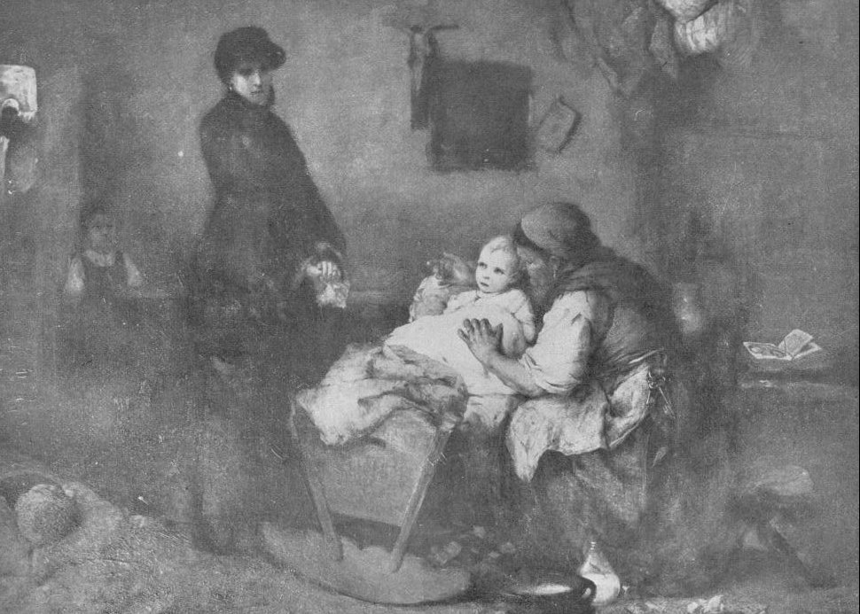 Baditz Ottó: Az angyalcsináló (olajfestmény, 1884–1885)